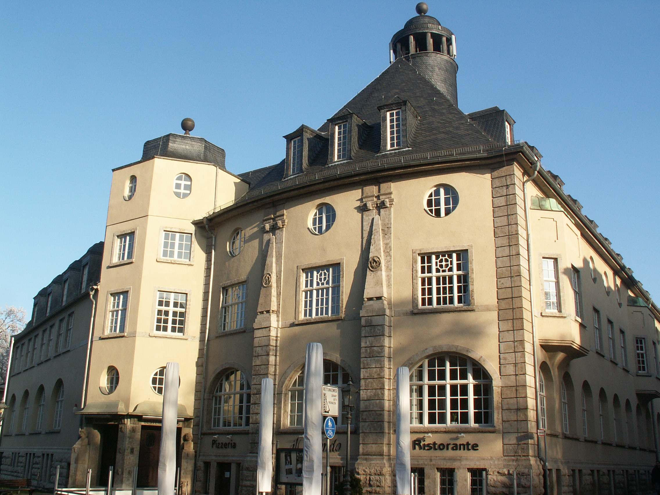 Bestehornhaus in Aschersleben